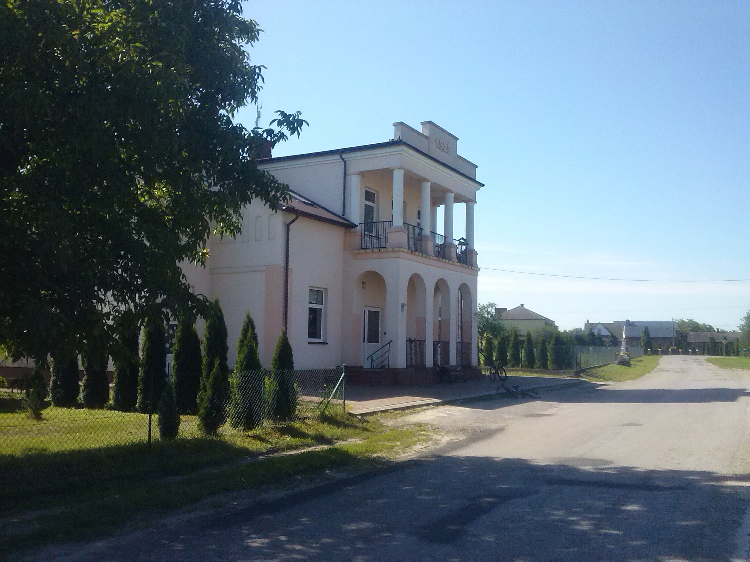 Wiejski Dom Kultury w Leżachowie